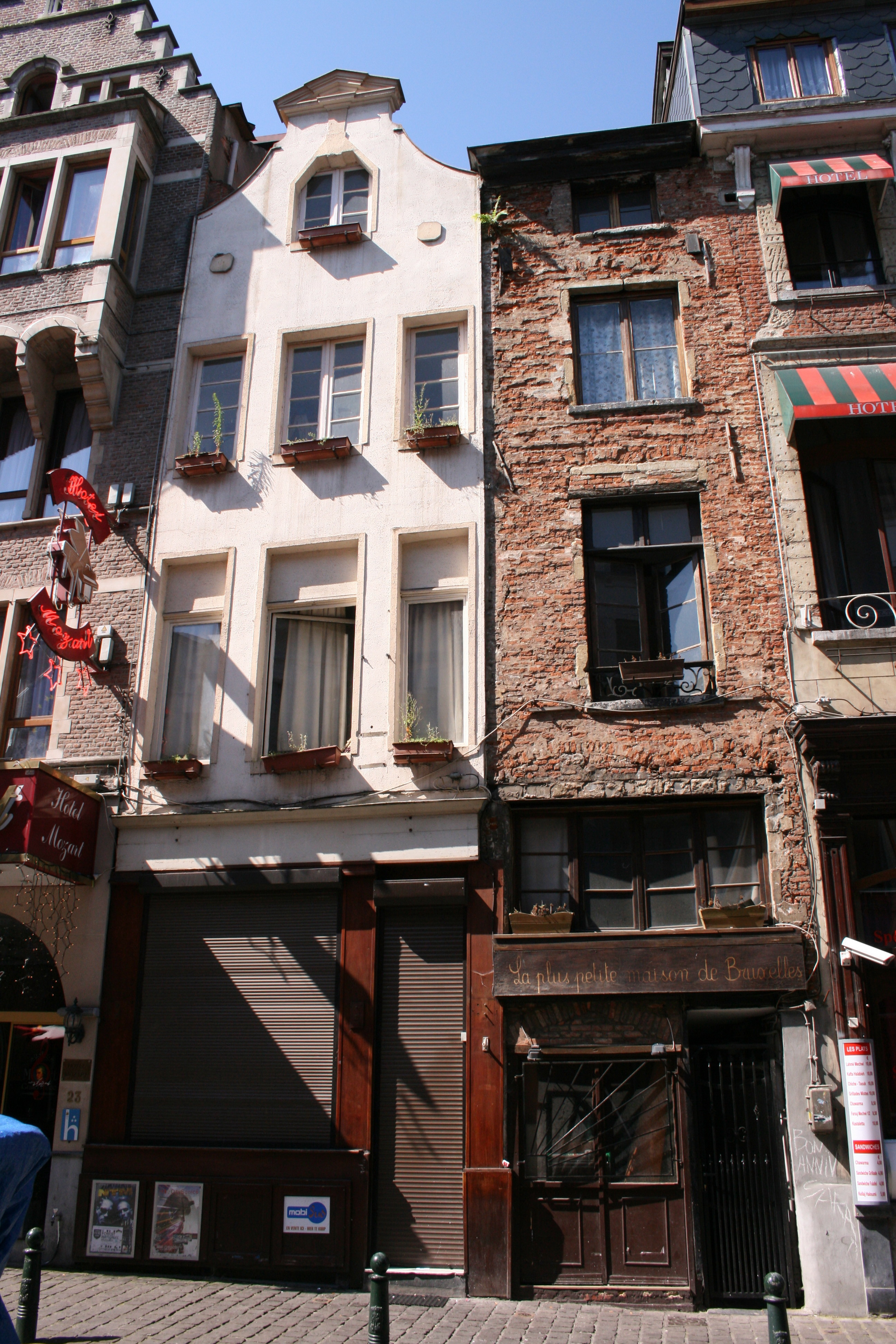 19 rue Marché aux Fromages (à droite sur la photo), Bruxelles, Belgique, connue sous le nom de "plus petite maison de Bruxelles" (18 m2)